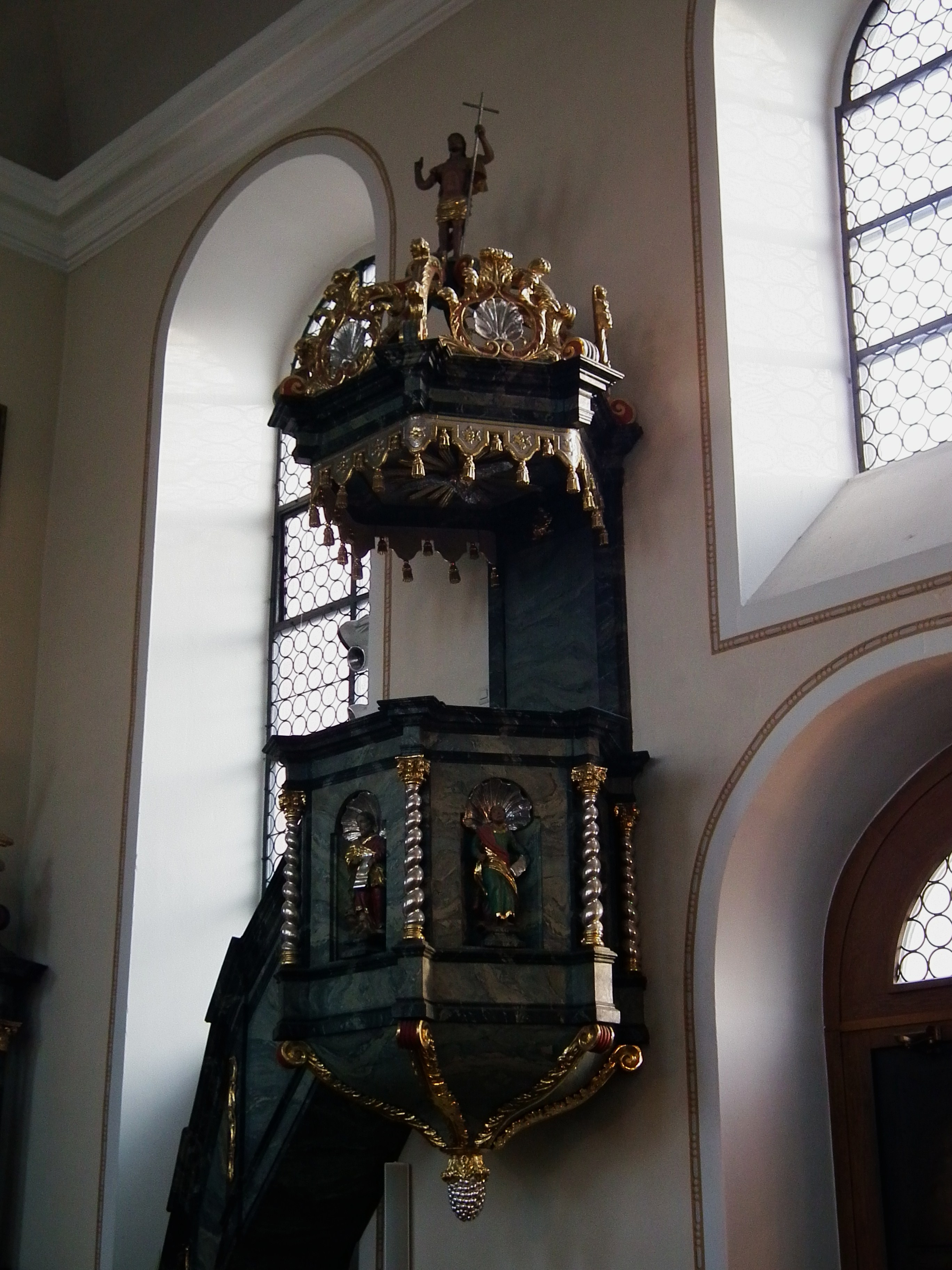 Kanzel in der katholischen Stadtpfarrkirche St. Pankratius in Schwetzingen (Baden-Württemberg, Deutschland)